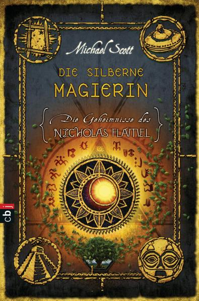 Michael Scott: Die Geheimnisse des Nicholas Flamel. Die silberne Magierin. cbj, München 2013. DNB